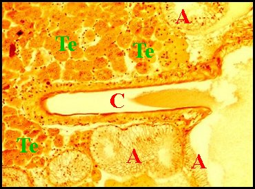 Vue d'ensemble du tissu endocrinoïde d'une Mastophora femelle adulte